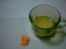 El colorante E102